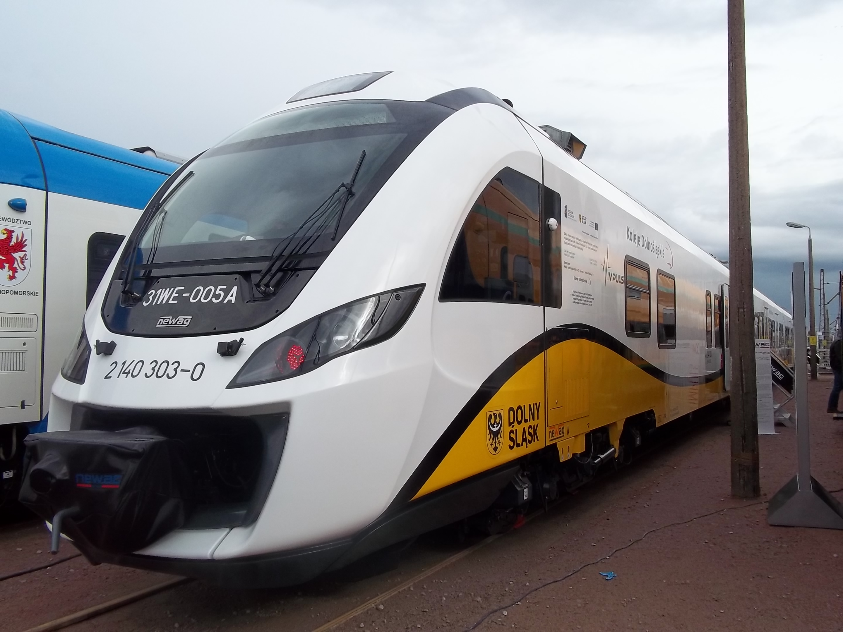 Elektryczny Zespół Trakcyjny typu 31WE "Impuls", wyprodukowany przez Grupę NEWAG.